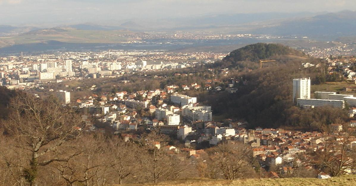 Vallée de Royat : le vieux bourg au premier plan, la ville thermale au second plan et Clermont-Ferrand à l'arrière plan.